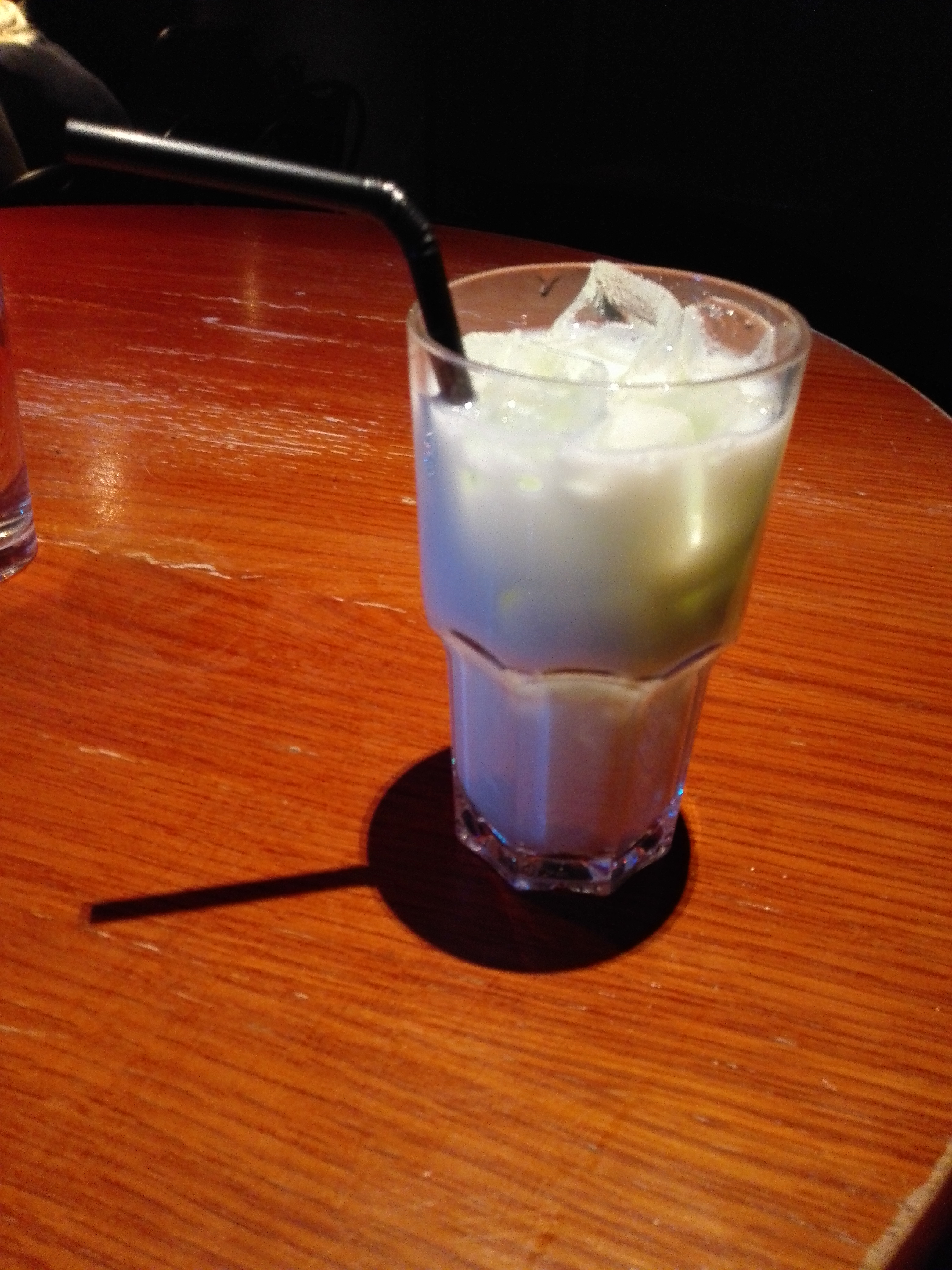 Ville Vallaton -drinkki